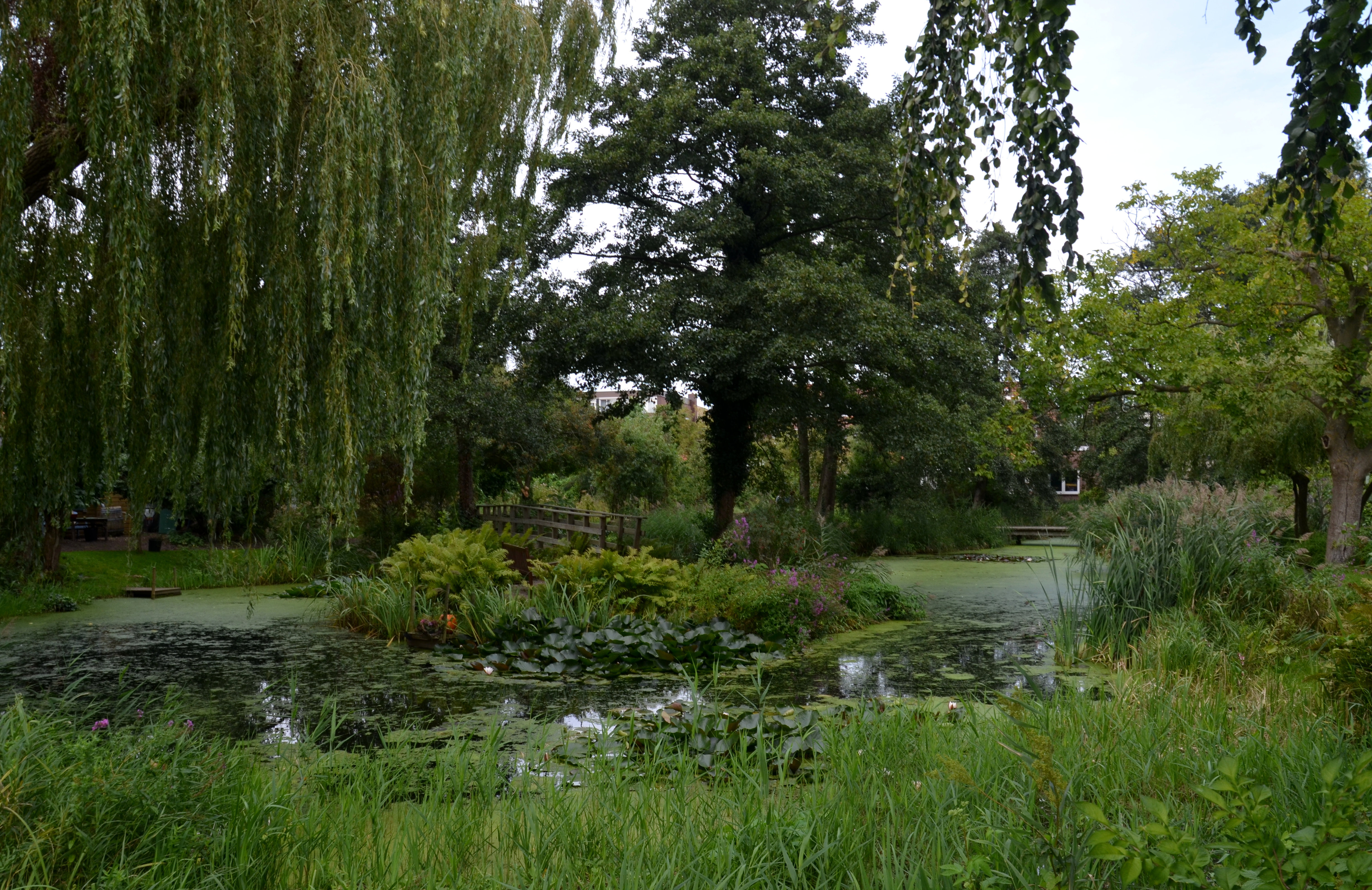 Zicht op centraal gelegen vijver van de Tuin van Kapitein Rommel